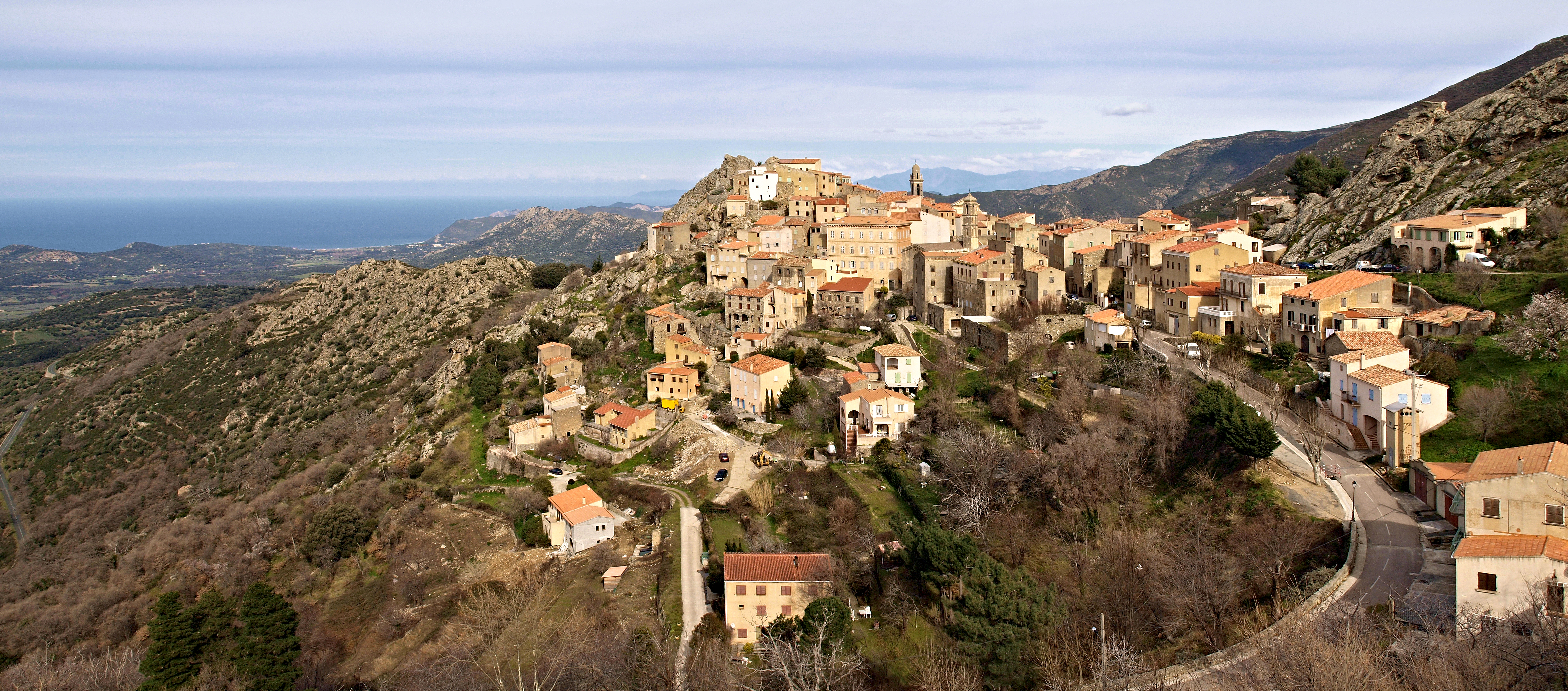 Speloncato (Corsica) - Vue du village